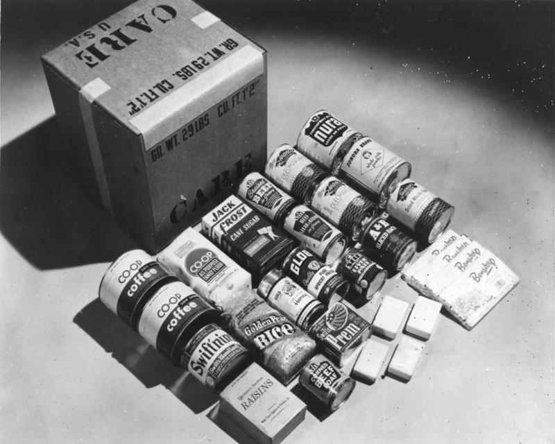 Factual corrections and alternative descriptions are encouraged separately from the original description. Additionally errors can be reported at this page to inform the Bundesarchiv. Original historic description: Inhalt eines CARE-Paket ADN-ZB/dpd Deutschland in den Nachkriegsjahren Mit der Ausgabe eines neuen verbesserten amerikanischen CARE-Paketes wurde in Westdeutschland begonnen. Es enthält 4 Pfund Fleisch, 3 Pfund Butter - je zwei Pfund Mehl, Zucker, Vollmilchpulver - je ein Pfund Reis, Honig, Marmelade und Rosinen, sowie 2 Pfund Kaffee, 1 Pfund Schokolade, 500 Gr. Eipulver und 4 Stück Seife. Der Preis betrug Dollar 10,--. 2572-48